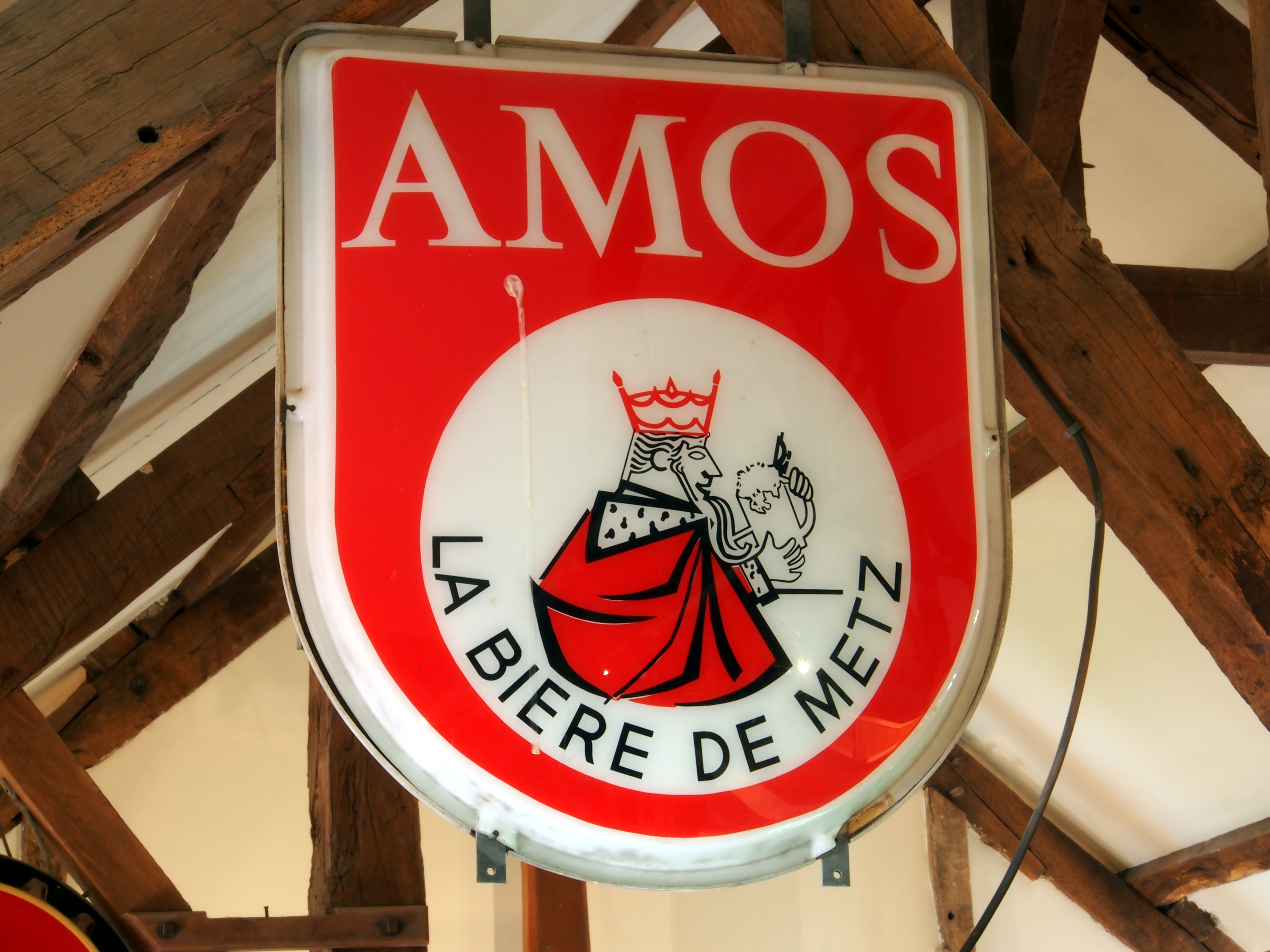 AMOS, La Biere de Metz sign.